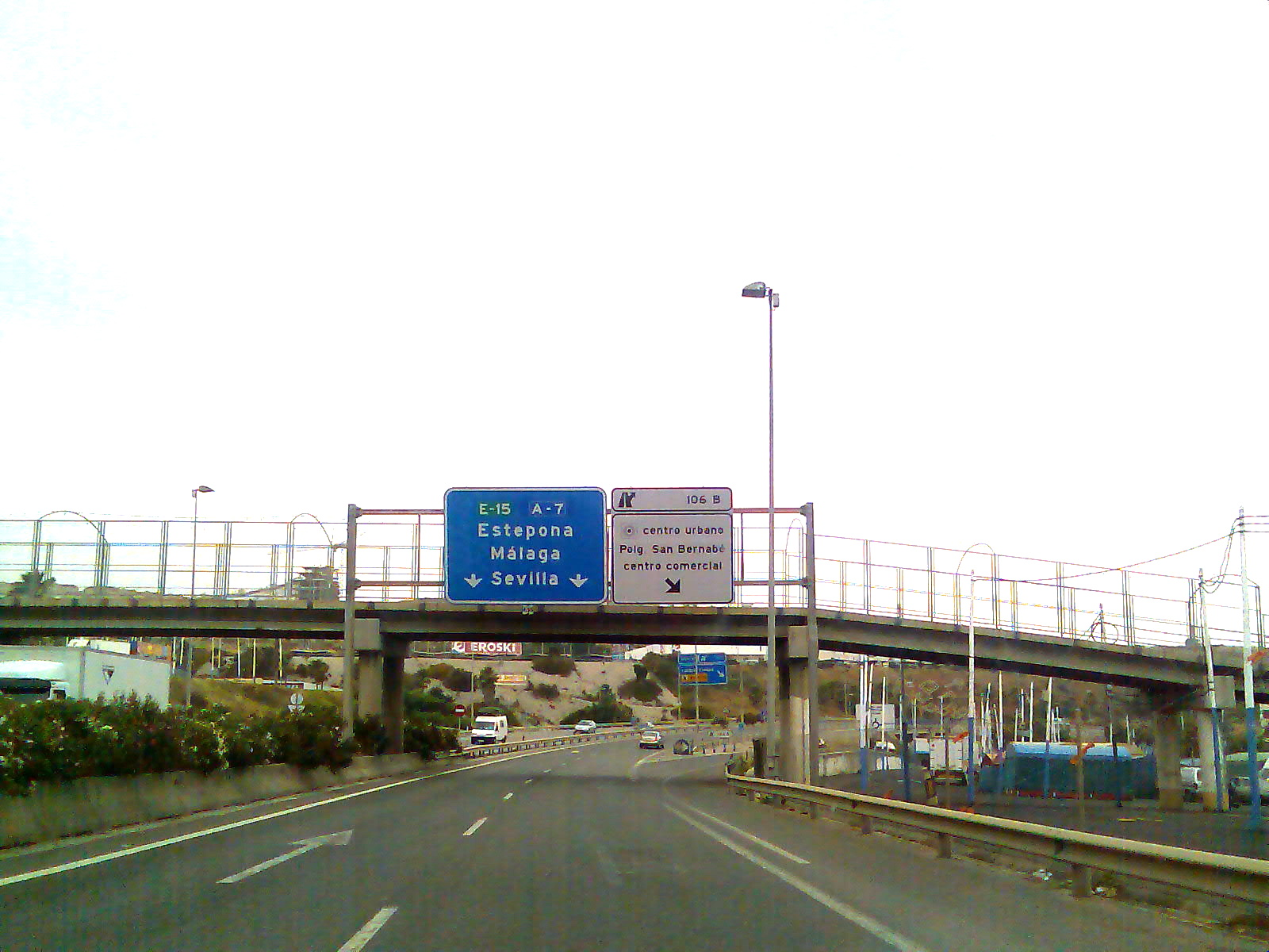 Spanish "Autopista del Mediterráneo 7" (A-7)Algeciras, (Cádiz, Spain)